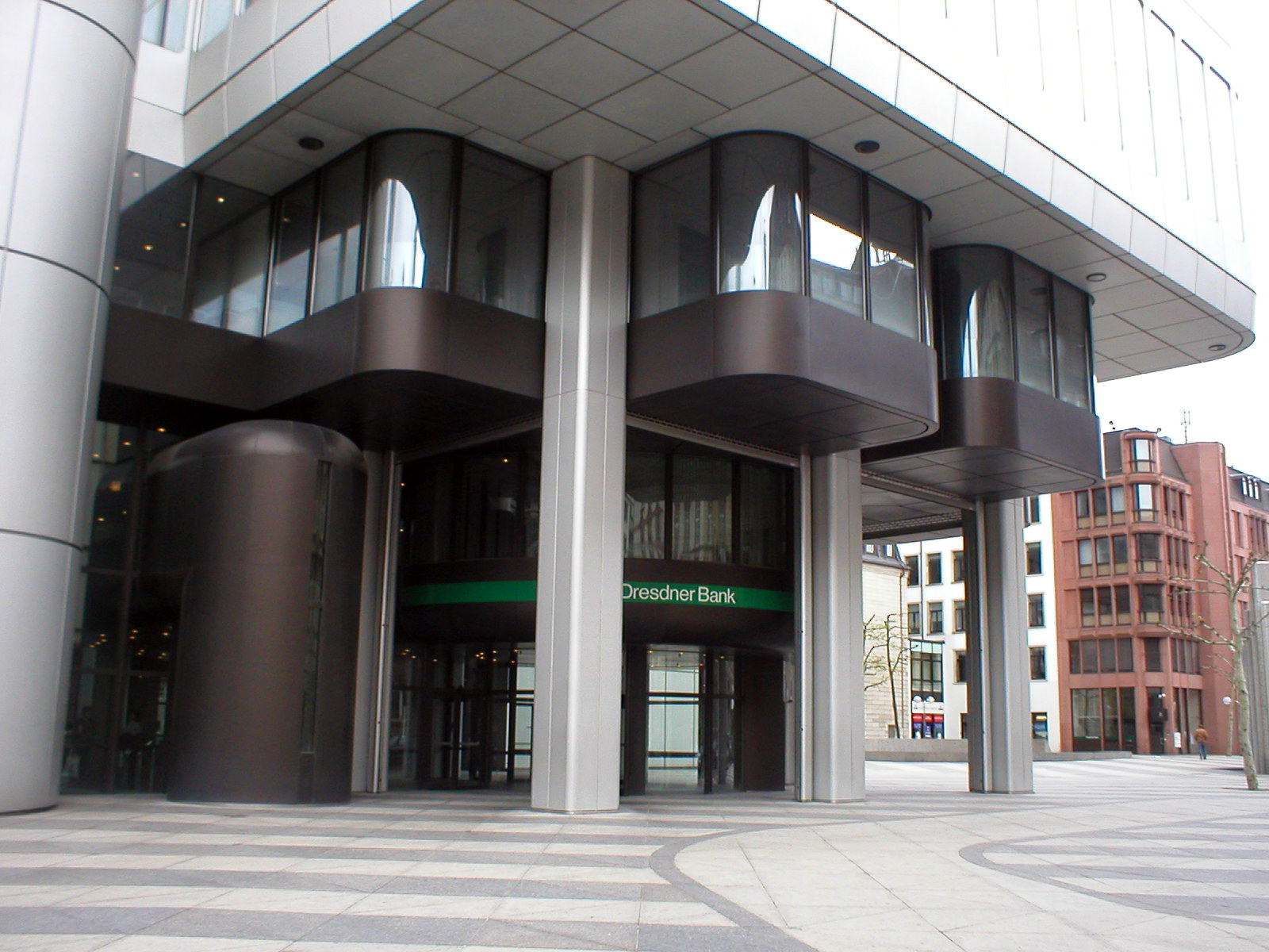 Dresdner Bank Zentrale in Frankfurt, Corporate Design mit dem "Grünen Band" entworfen von Otl Aicher